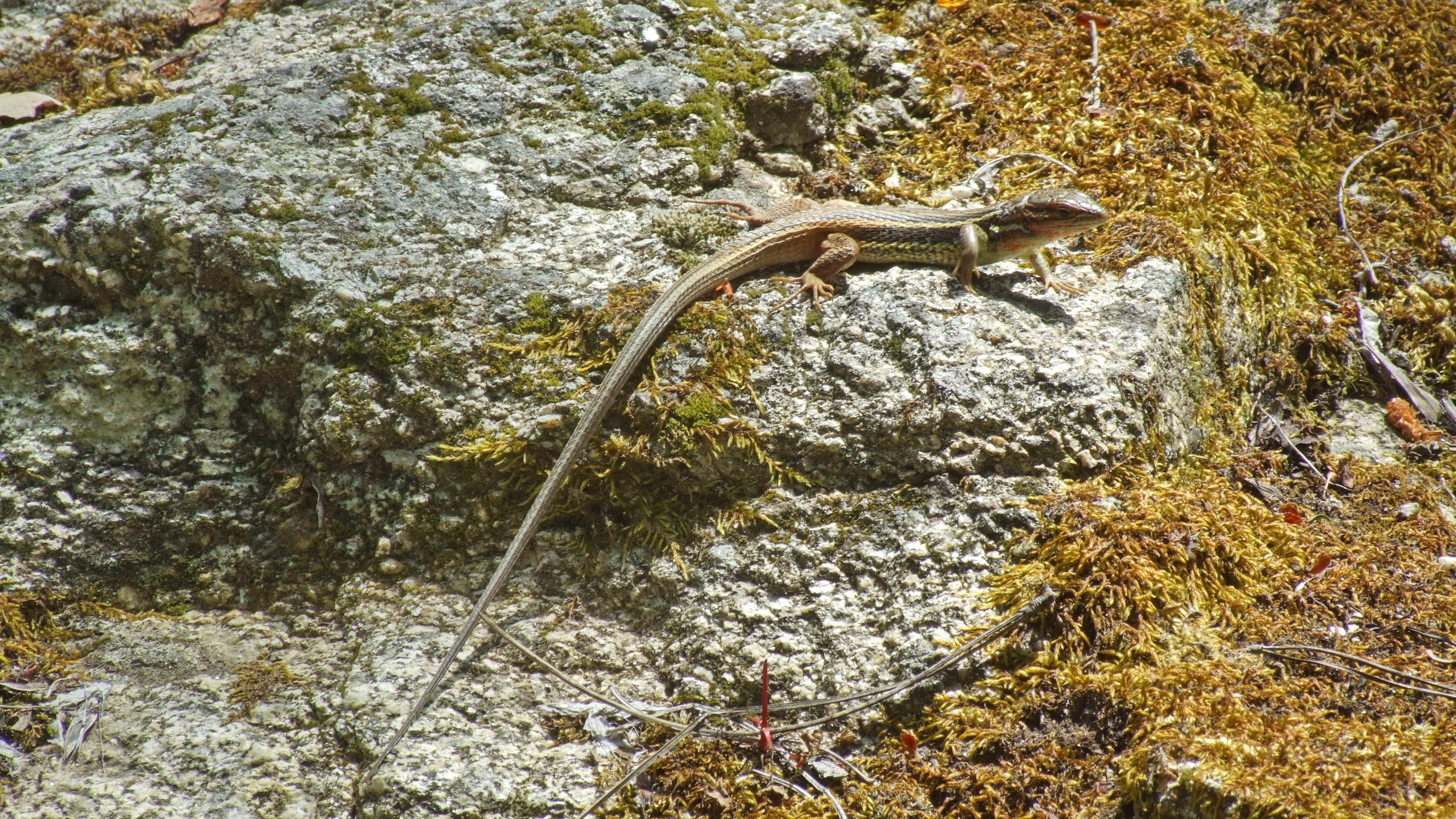 Lagartija serrana (Iberolacerta monticola)